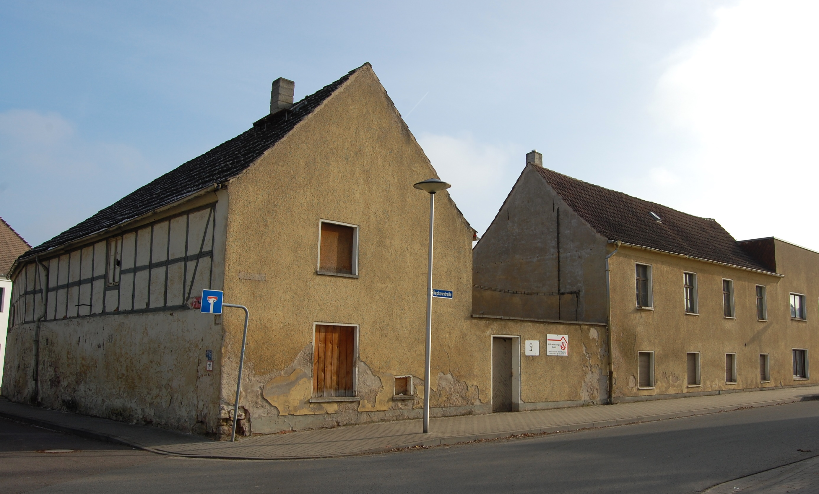 Haus Repkowstraße 9 in Magdeburg-Salbke